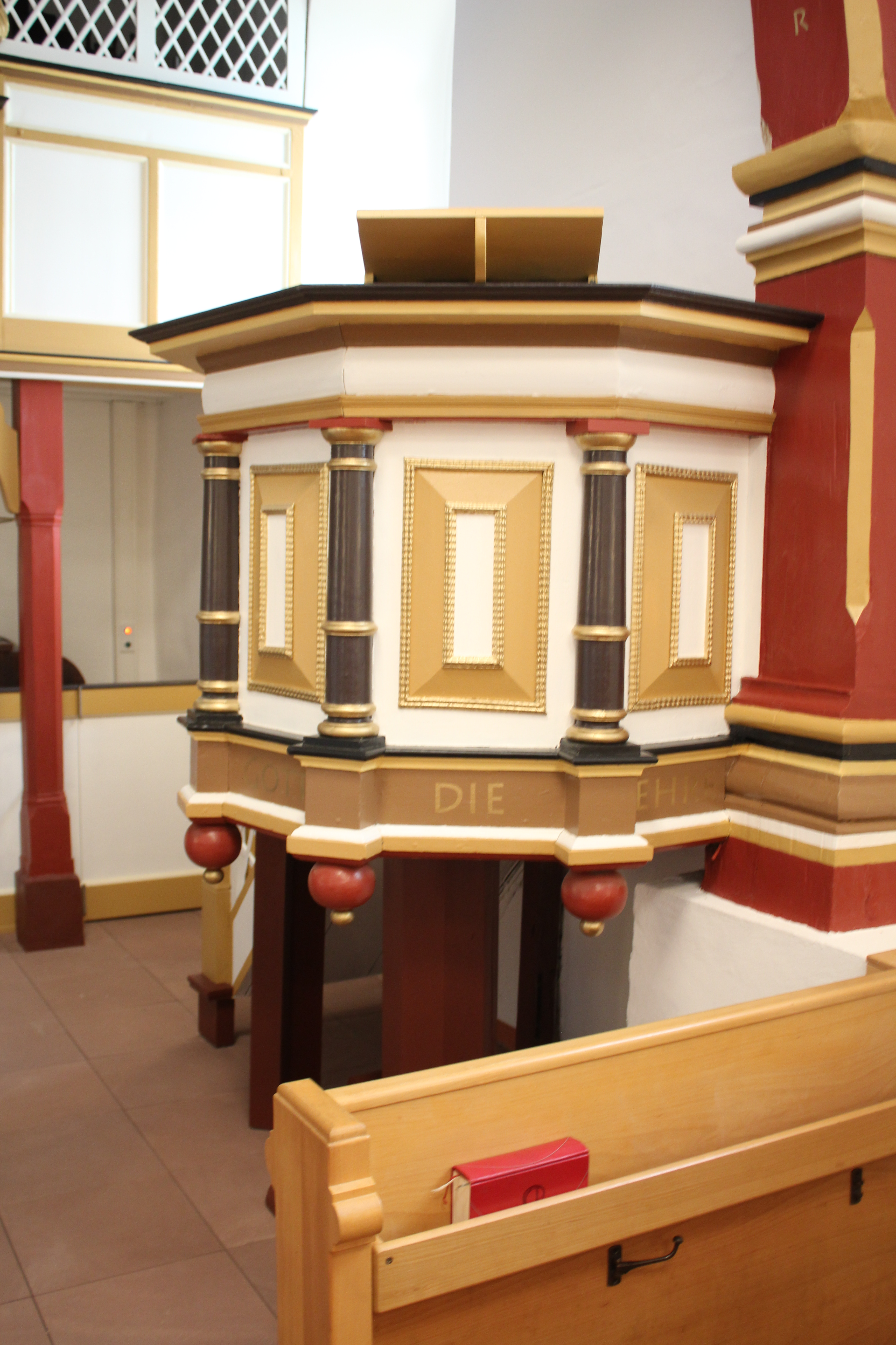 Evangelische Kirche Oberwetz, Gemeinde Schöffengrund, Hessen, Deutschland